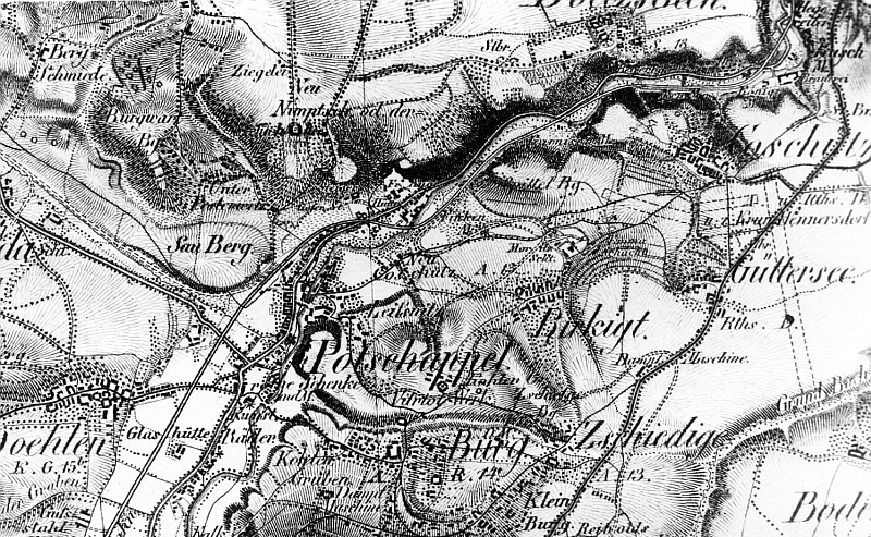 Original image description from the Deutsche Fotothek Freital-Potschappel. Oberreit, Sect. Dresden, 1821/22